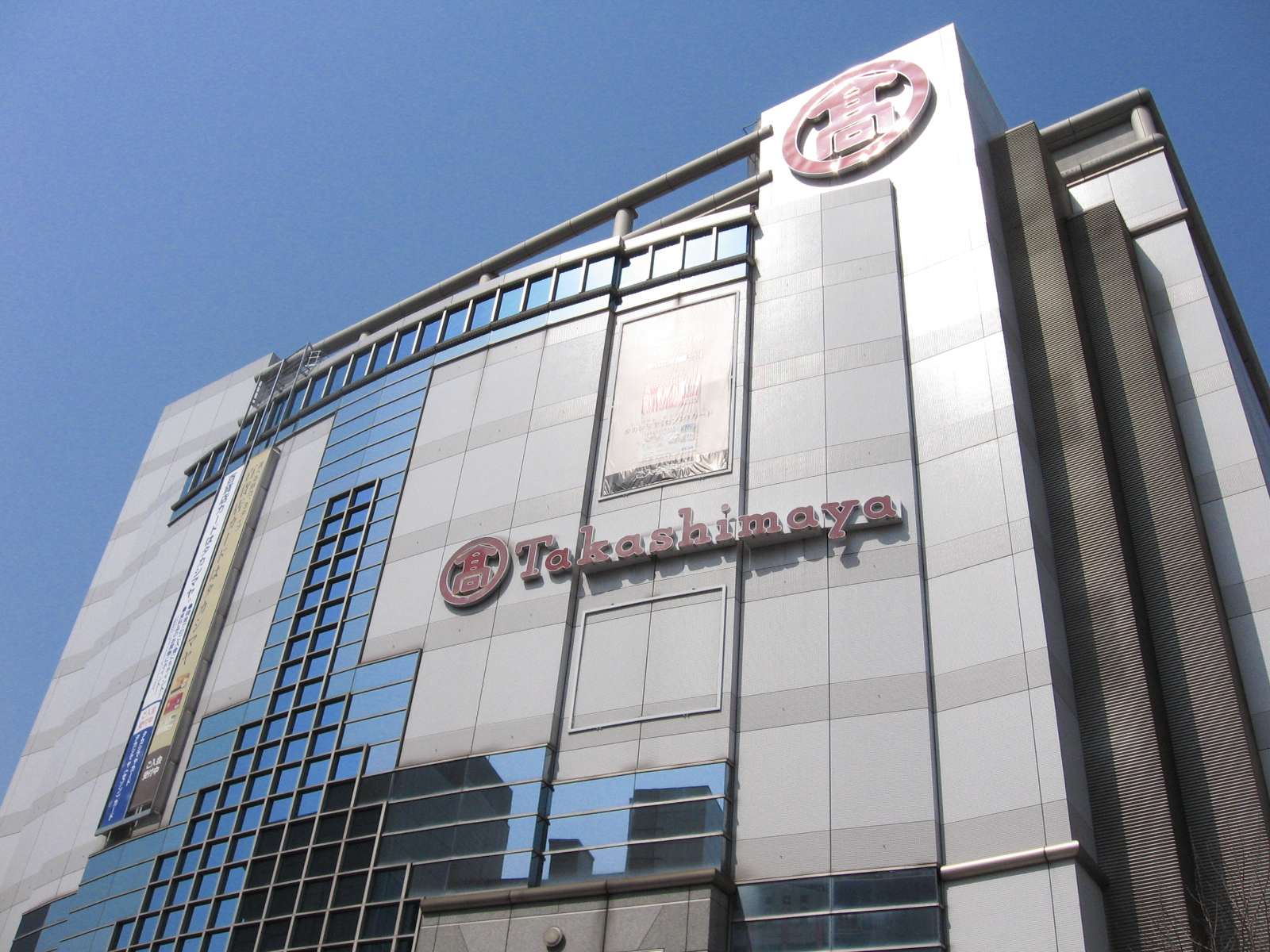 Takashimaya in Tachikawa, Tokyo.